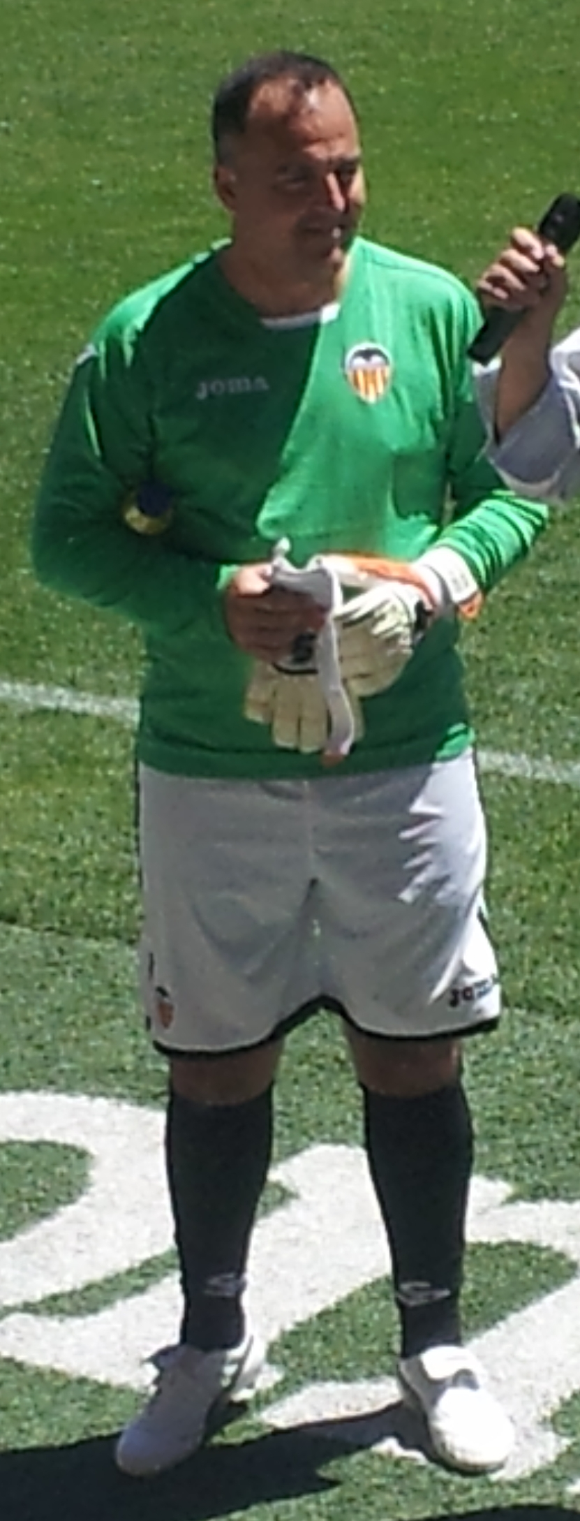 L'ex-jugador valencianista en 2013.